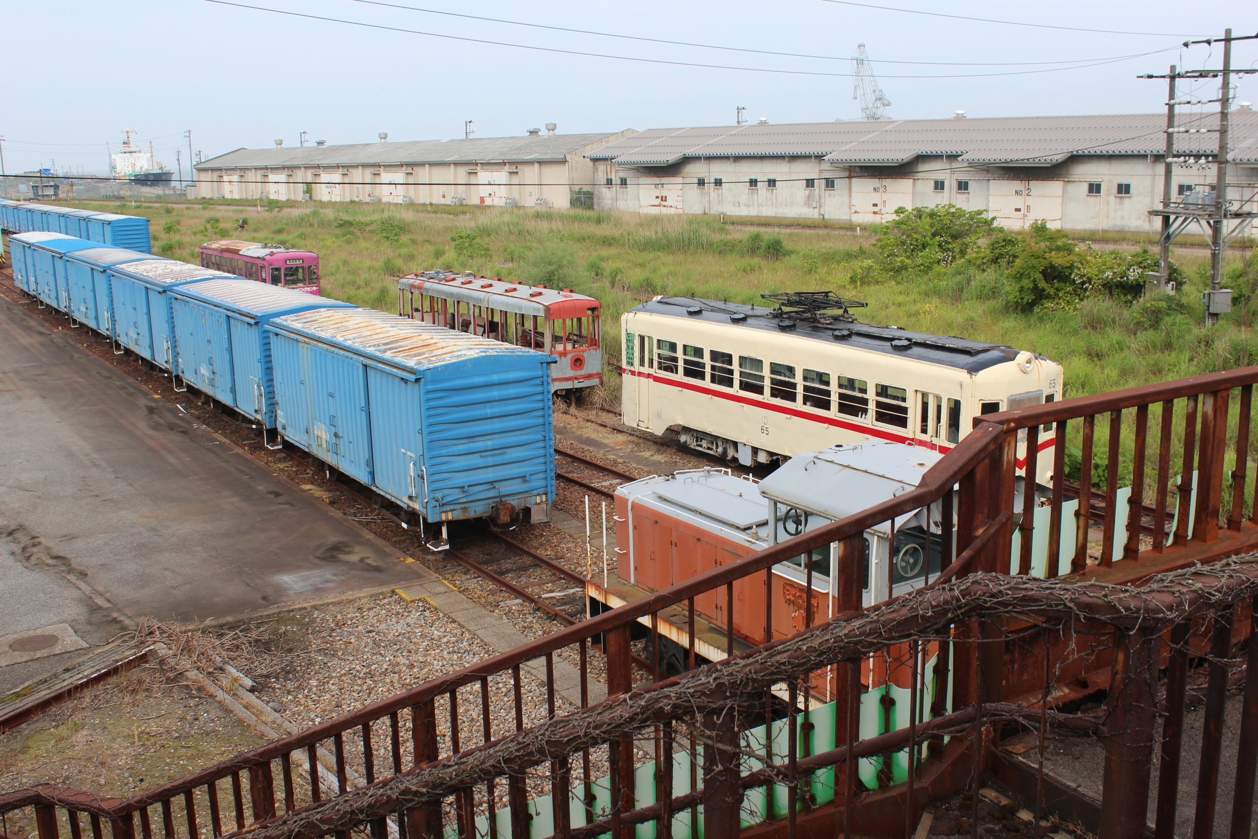 伏木駅付近にある貨物専用線跡